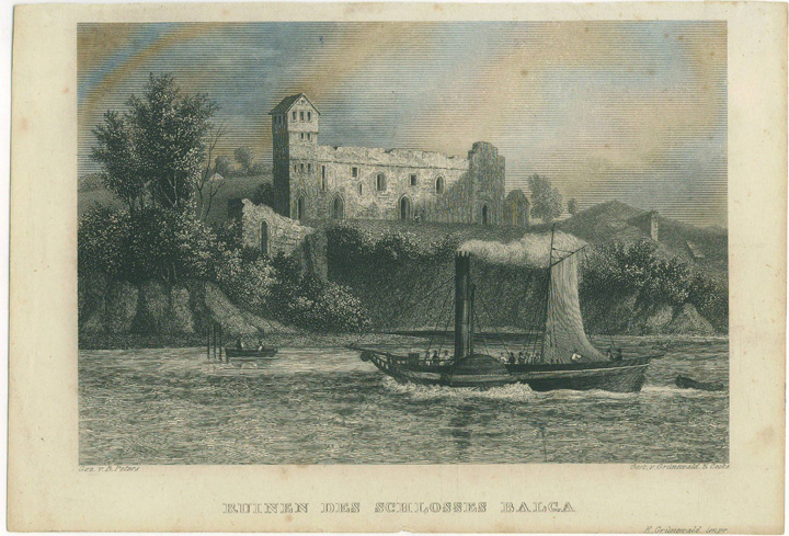 Ruine Schloss Balga - um 1850